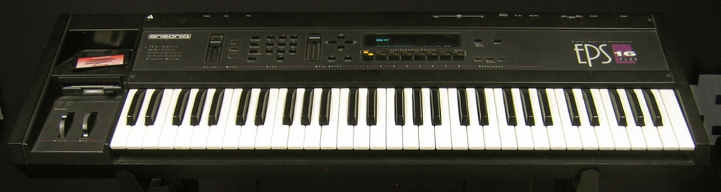 Ensoniq EPS-16+ 16bit Performance Sampler